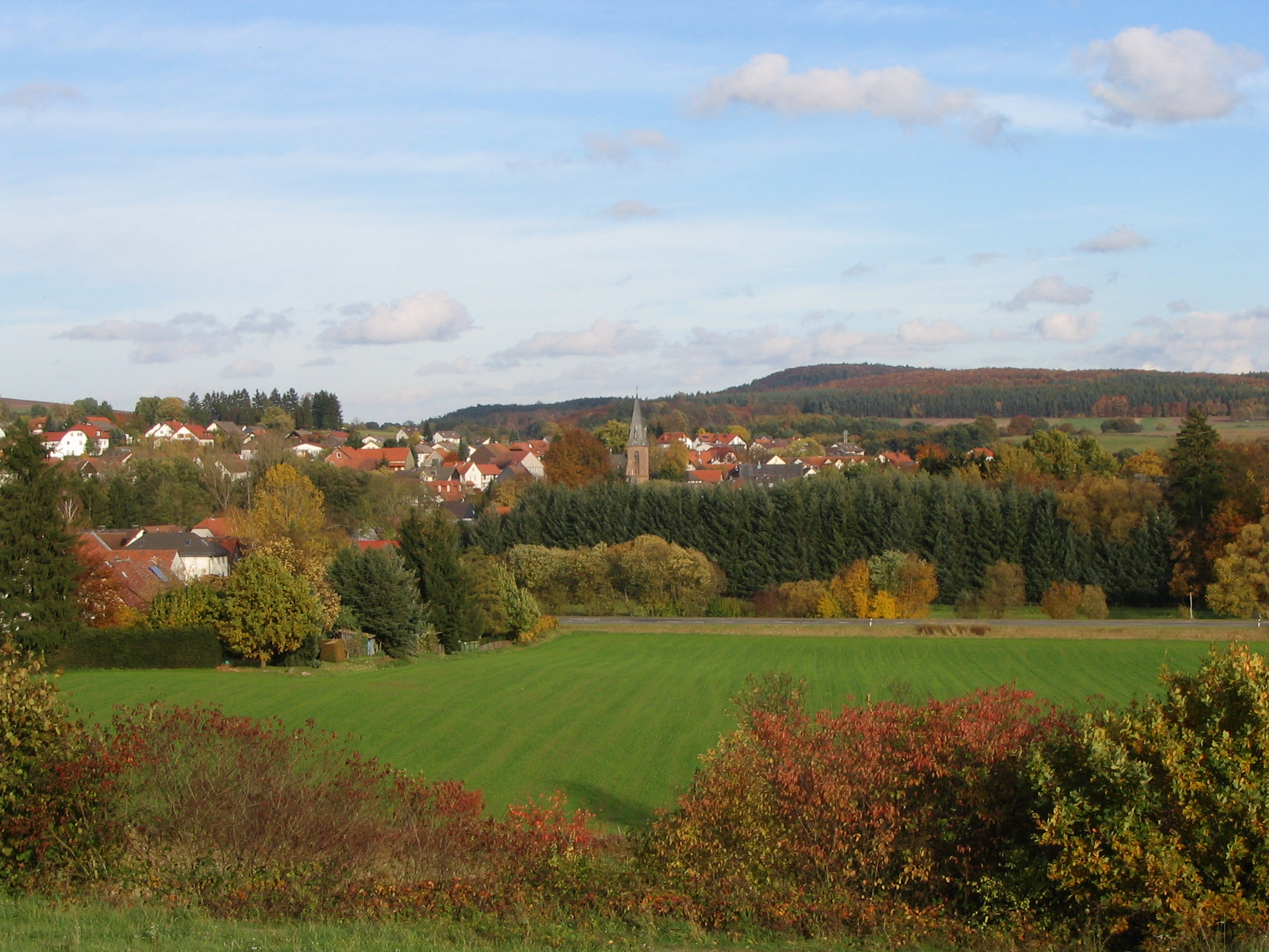 Cölbe-Schönstadt, im Oktober 2004